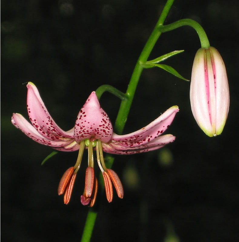 Aufgeblühte Türkenbundlilie (Lilium martagon) im Naturschutzgebiet Oberhagen, Warstein, Deutschland.